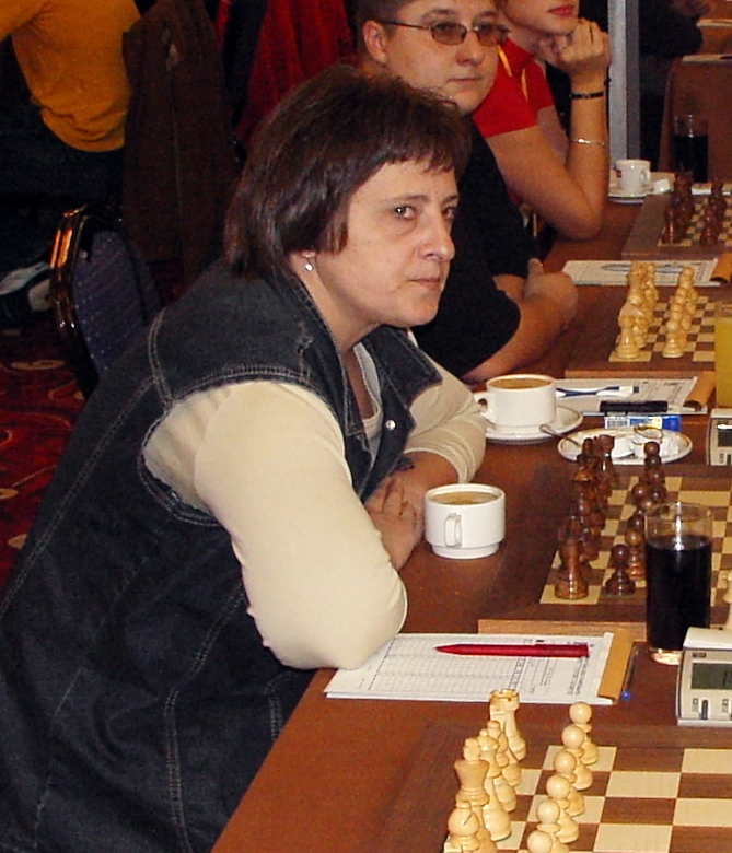 WGM Irina Chelushkina Serbia, Iraklion 2007